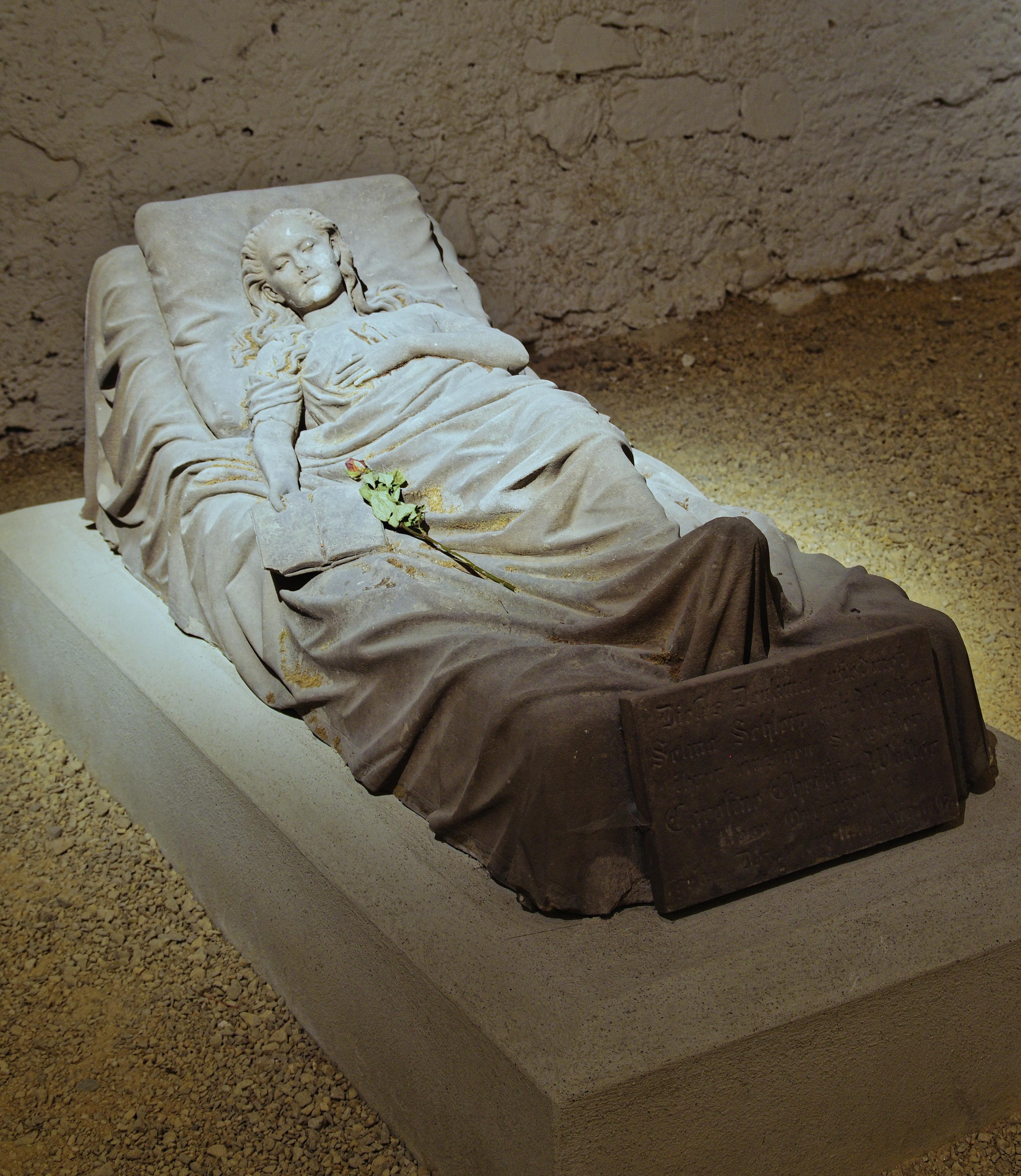 Originalggrabsteine vom Alten Friedhof in der Gruft von St. Ursula in Freiburg Das Grab der Caroline Christine Walter aus Opfingen gefertigt von Anton Burghart